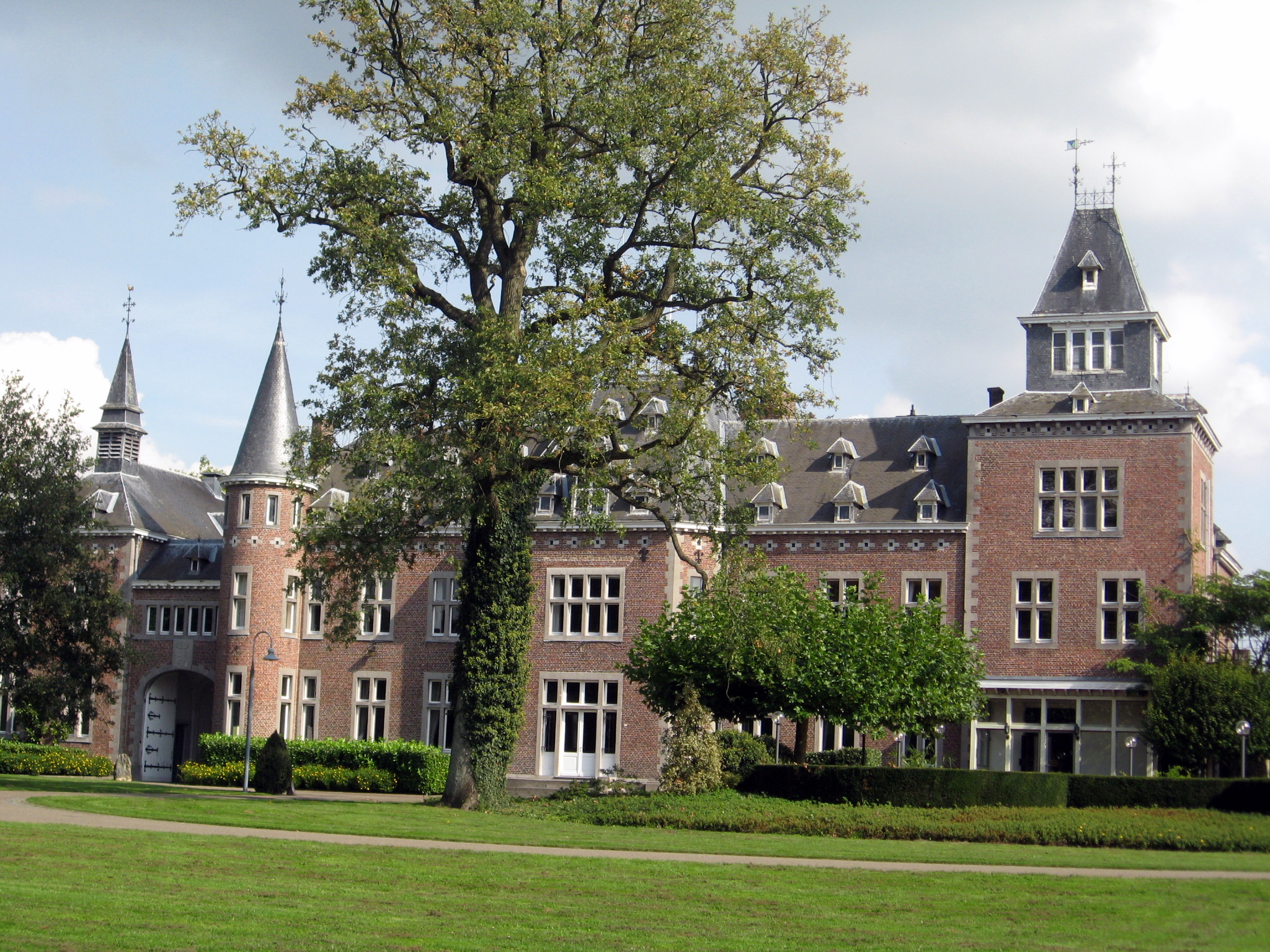 Kasteel van Bokrijk in Genk